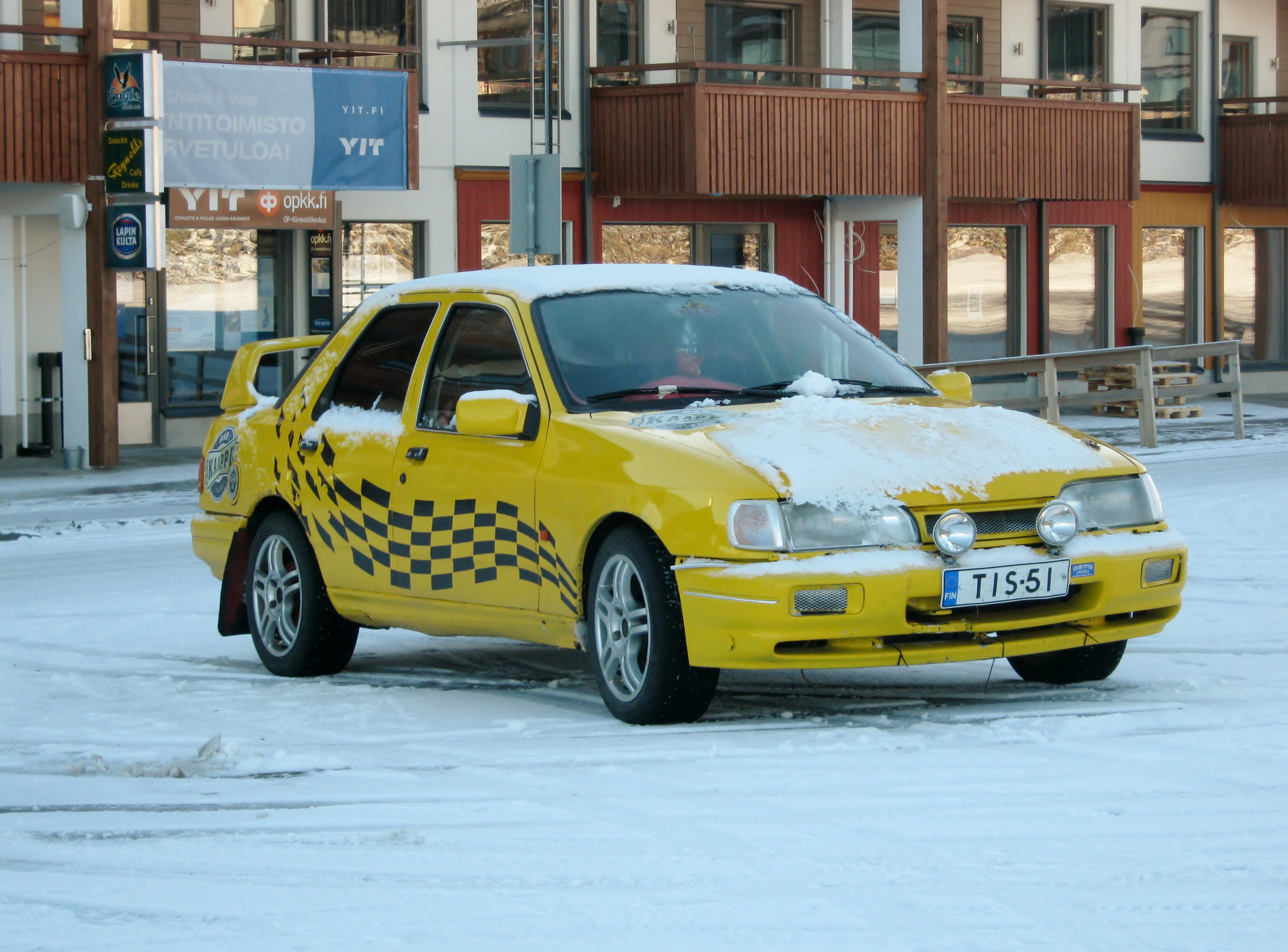 Ford Sierra (TIS-51), jota käytettiin elokuvassa Napapiirin Sankarit.